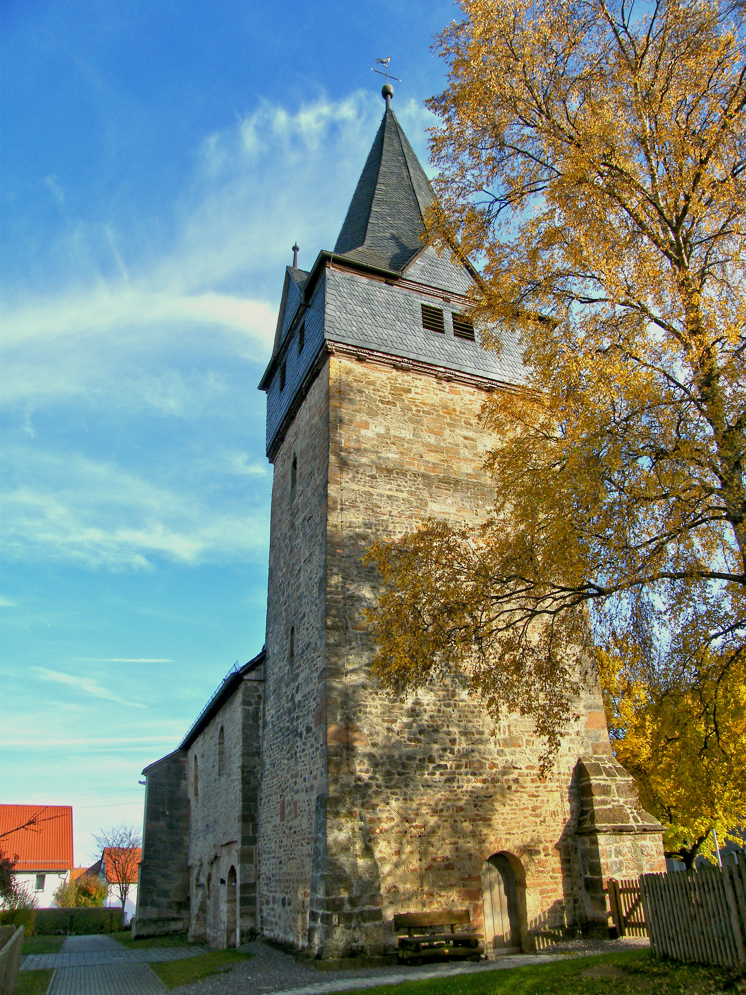 Turm Romanische Kirche Twistetal-Mühlhausen aus dem 12. Jahrhundert